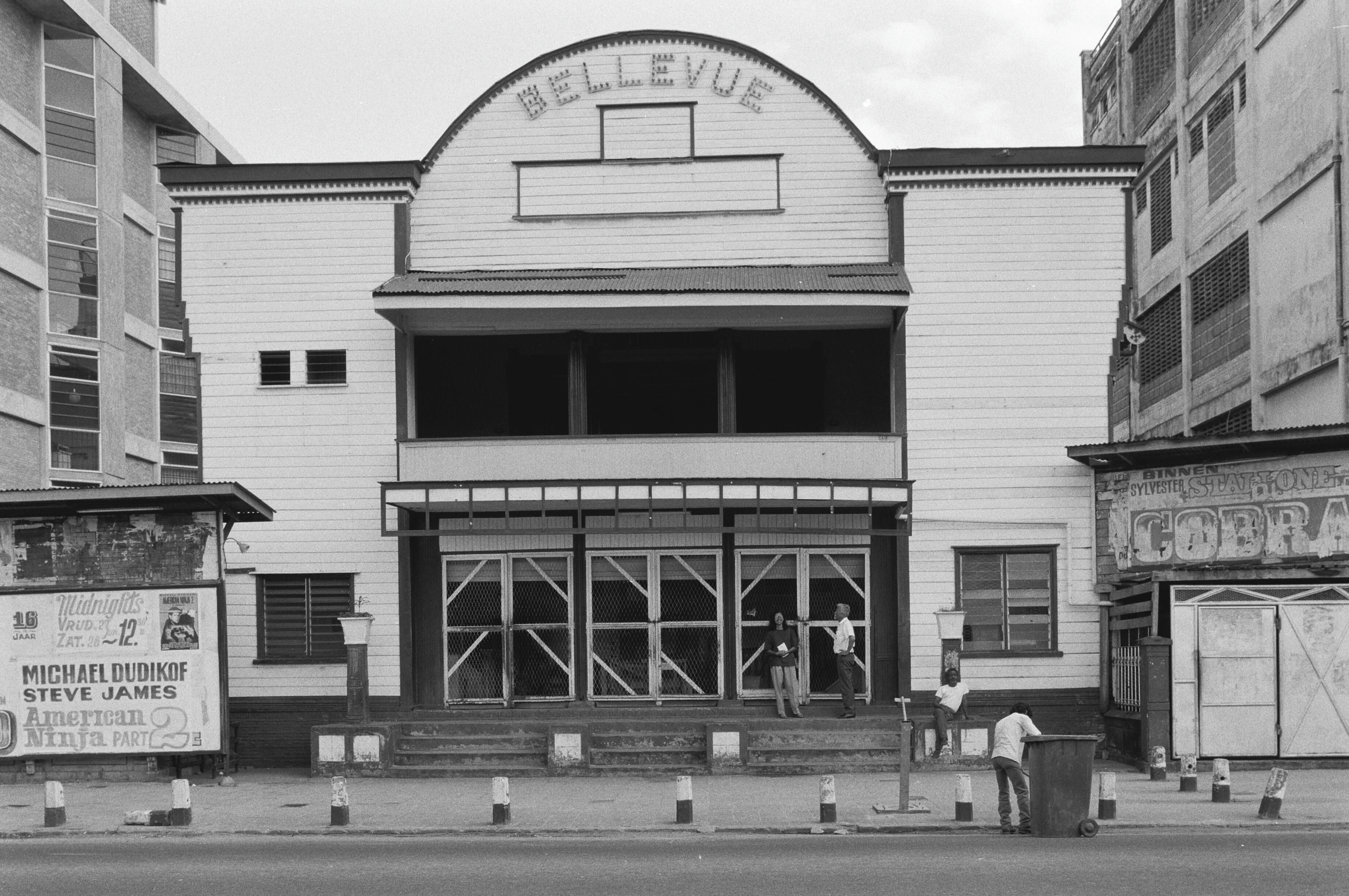 Bioscoop Bellevue, gevelOnderwerp: Bioscoop